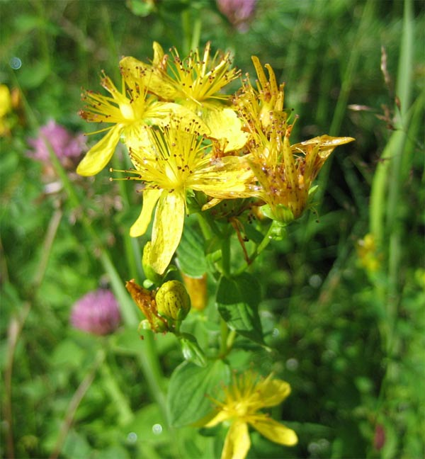 Blommande johannesört.